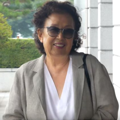 7월 13일 오후 서울시 영등포구 여의도 KBS 별관에서 '해피투게더4' 녹화가 진행됐다. 이날 녹화는 '디어 마이 프렌즈 특집'으로 김영옥X나문희X박원숙X고두심과 MC 유재석, 전현무, 조세호, 조윤희가 출연한다.